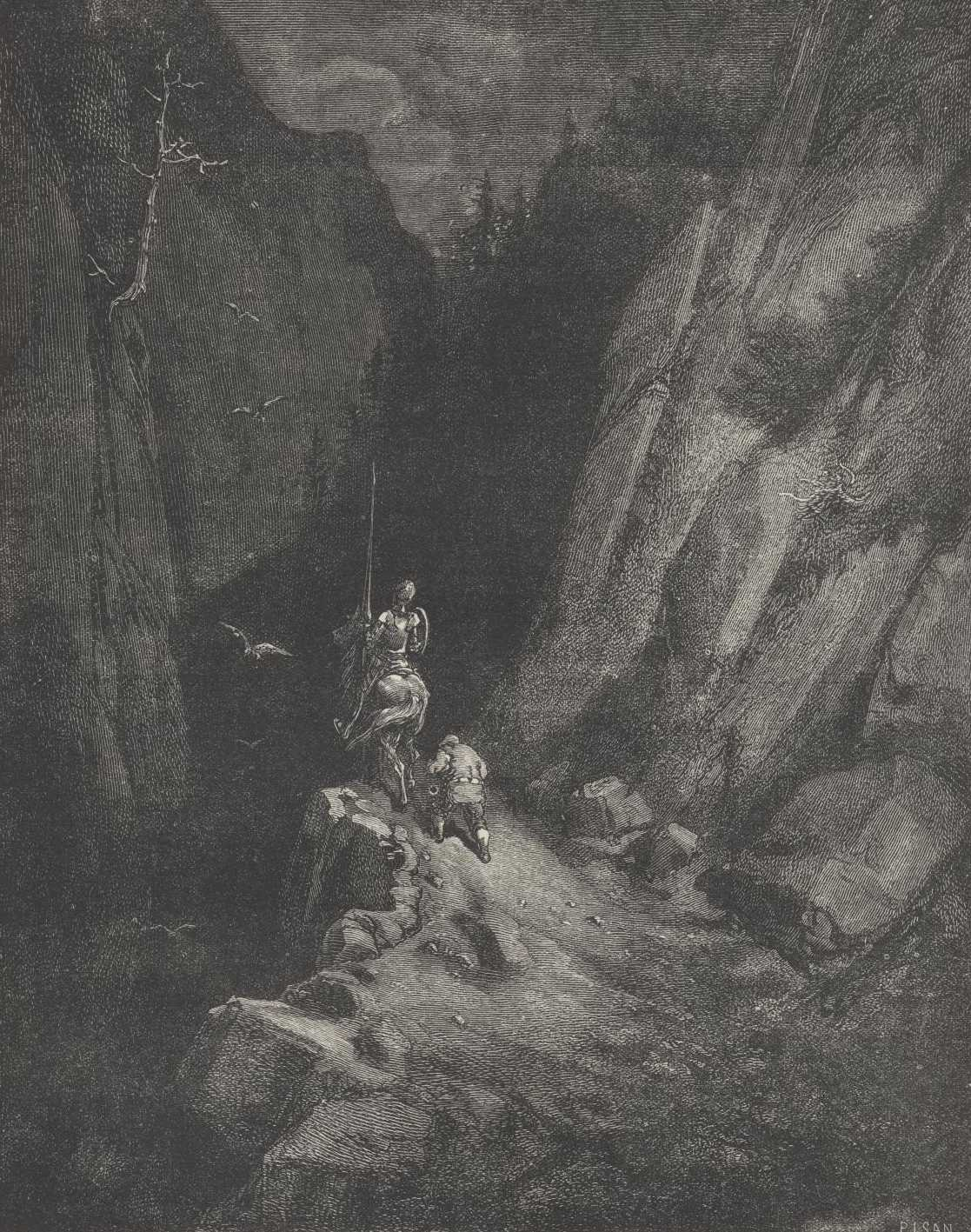 Dom Quixote e Sancho Pança no desfiladeiro